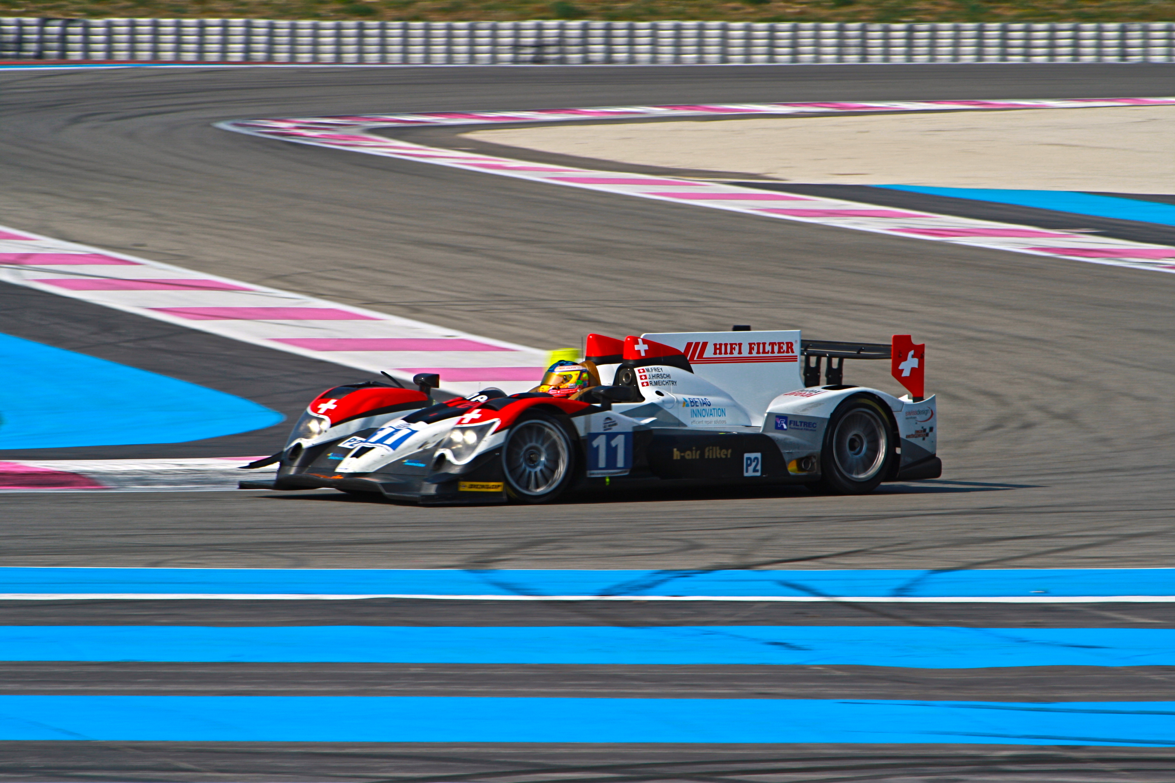 ELMS 2012 Paul-Ricard LMP2 Oreca/JUDD Jonathan Hirschi